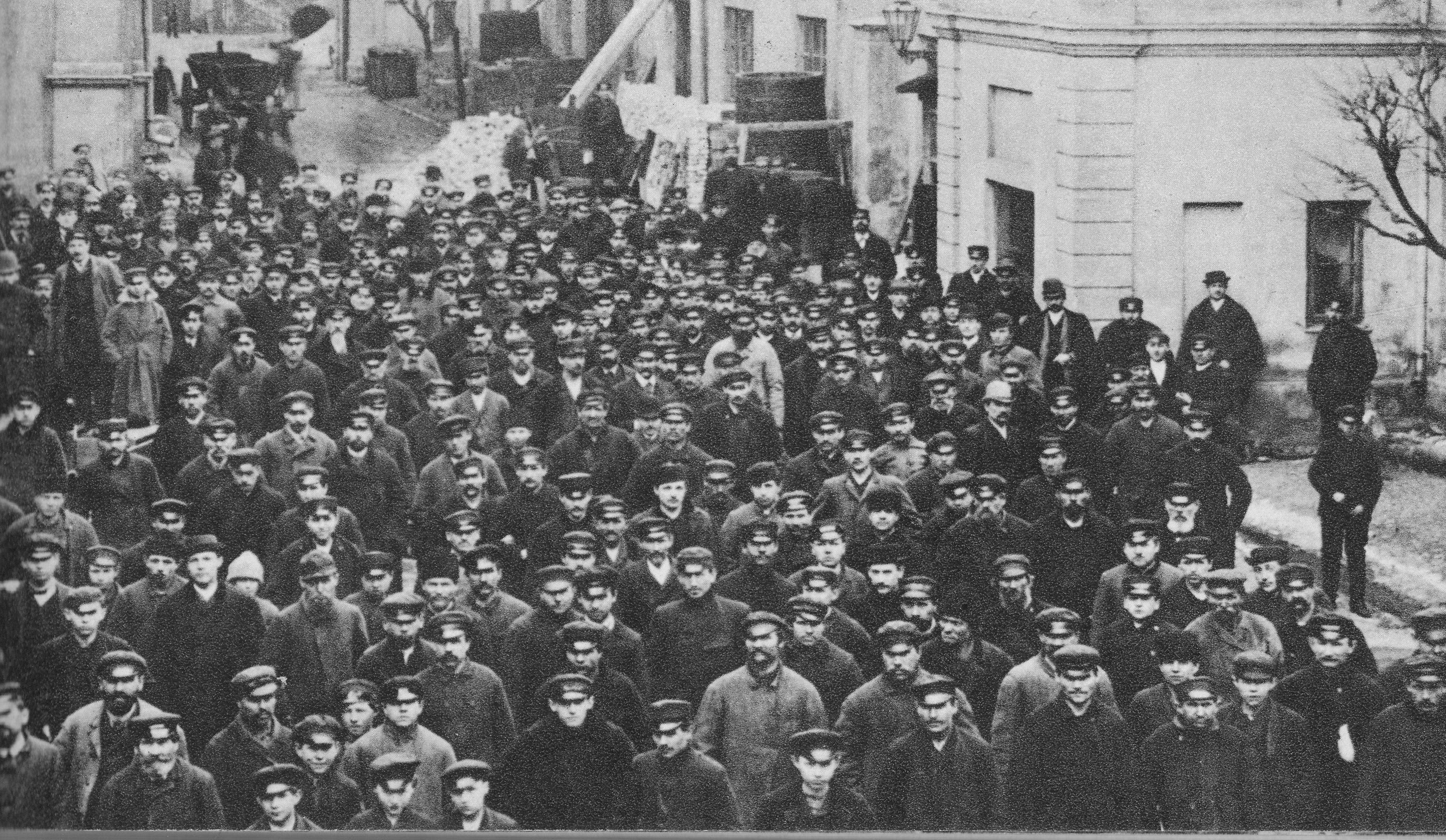 Wiec w zakładach Norblina w Warszawie